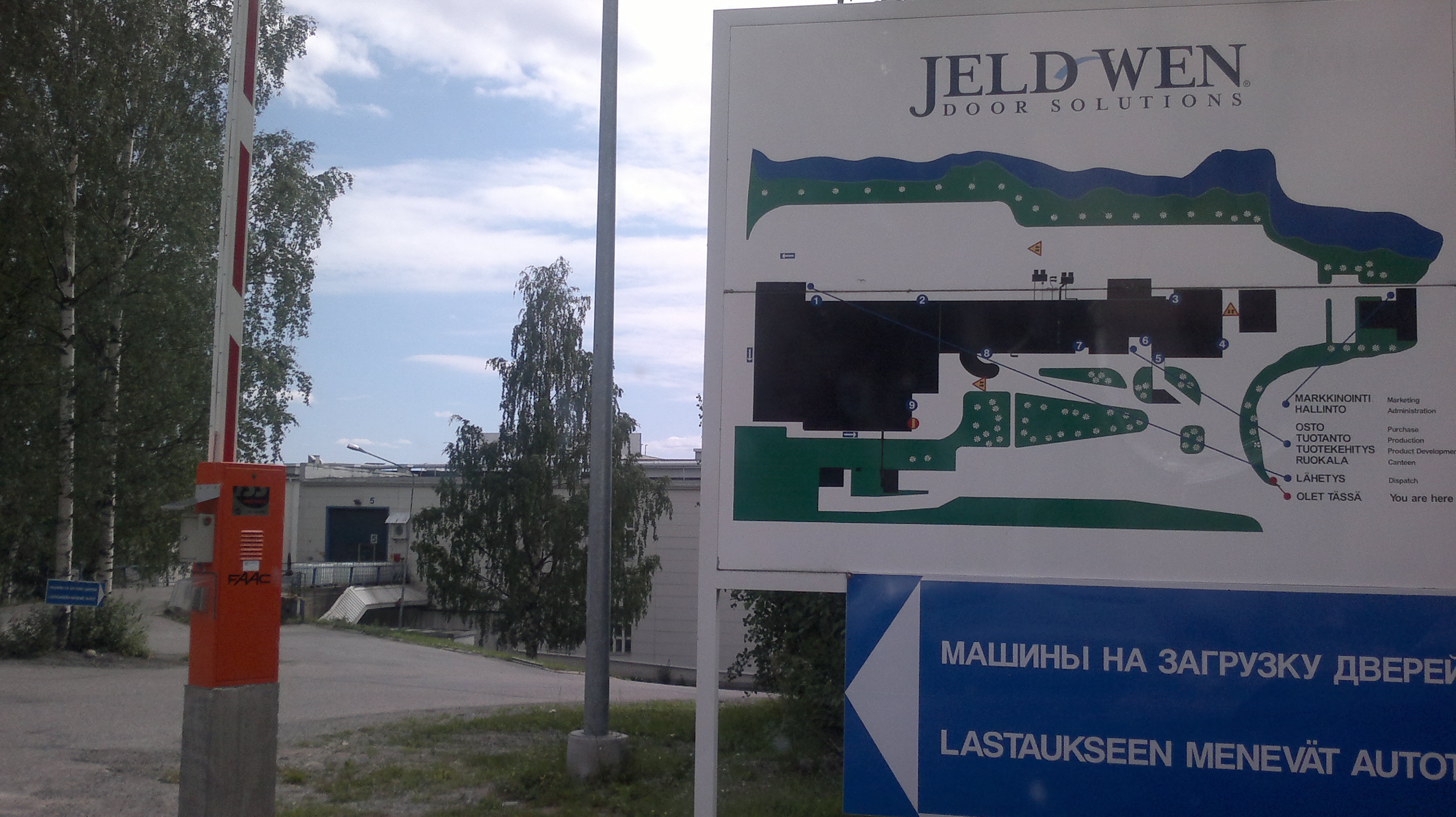 Jeld-Wenin tehdas Kuopiossa.